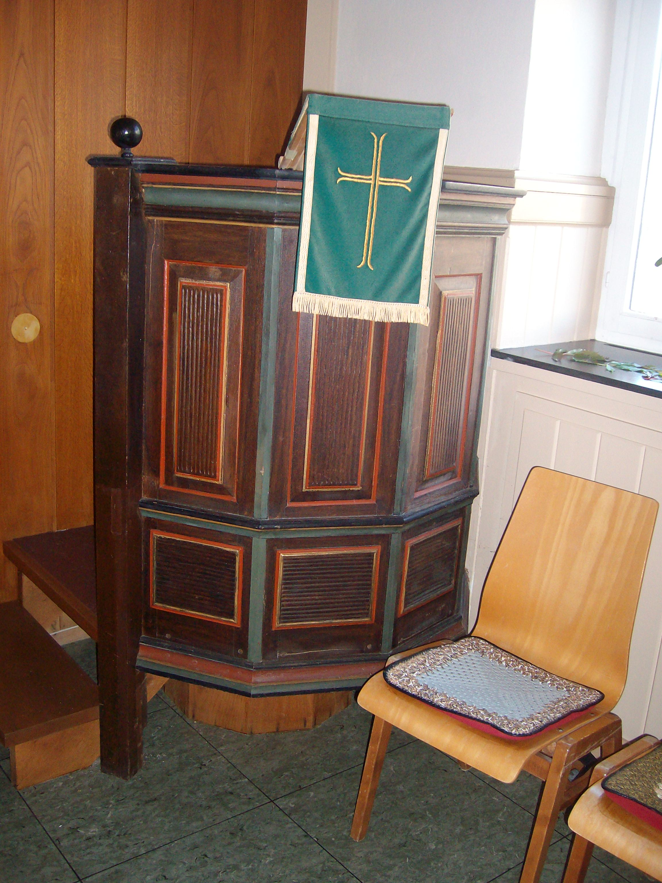 Kanzel der Evangelischen Kirche Altenhain, Laubach, Landkreis Gießen, Hessen, Deutschland